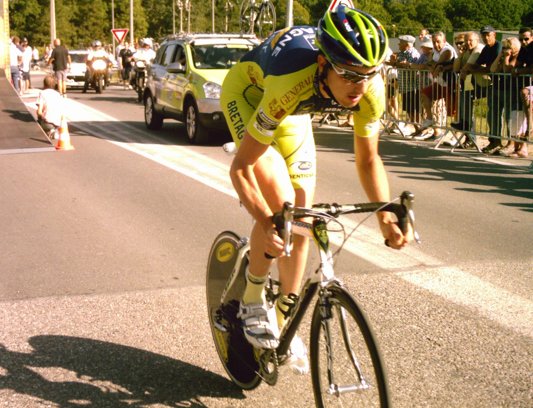 Jean-Marc Bideau au départ du contre-la-montre de la troisième étape b du Tour de l'Ain 2009